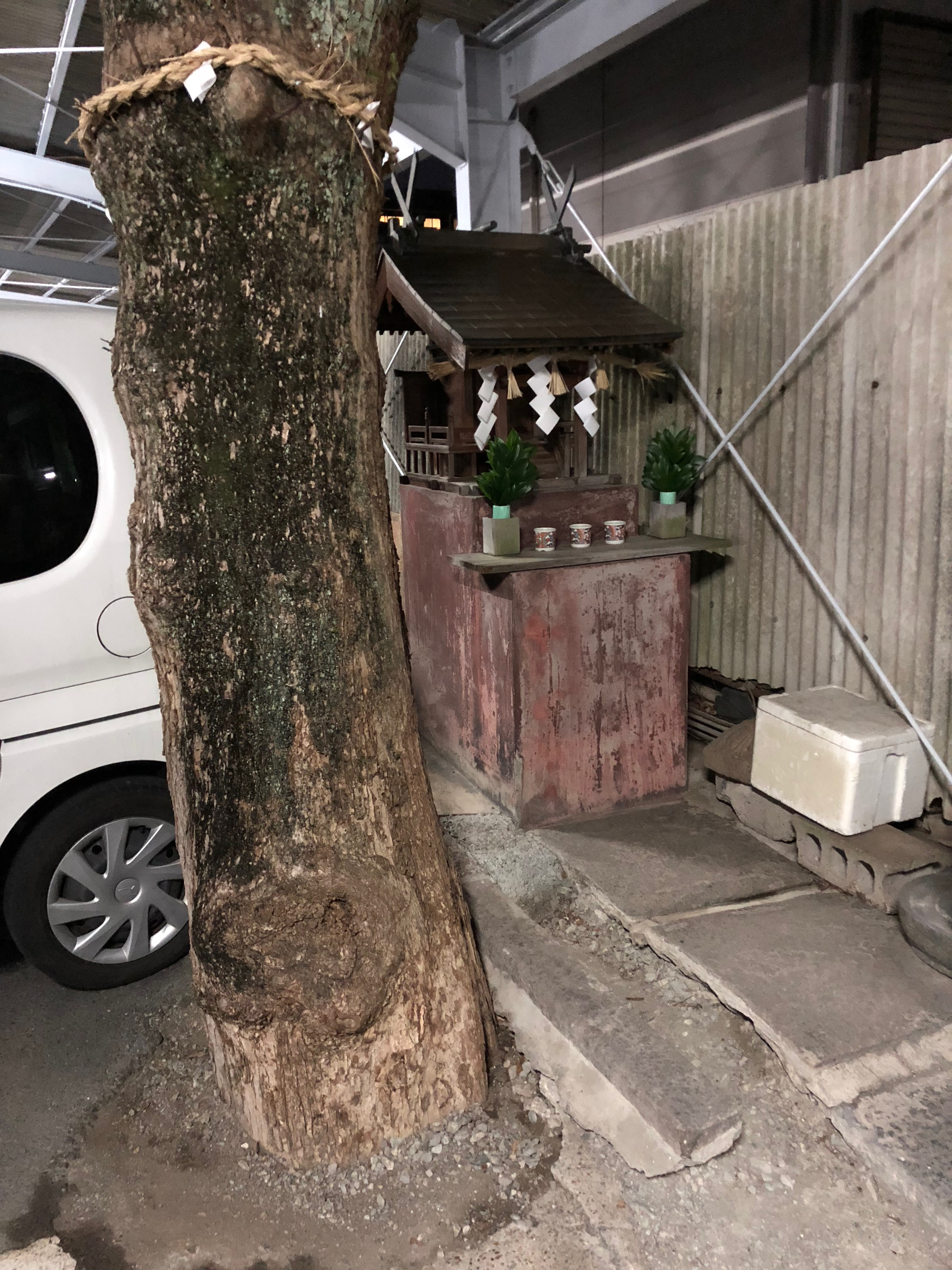 奈良市西城戸町 旧率川阿波神社伝承地